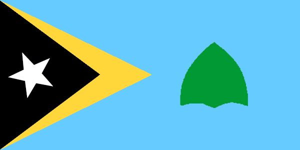 Bandeira do Ainaro. O Tatamailau, o monte mais alto de Timor, encontra-se no distrito de Ainaro. A sua silhueta faz parte do brasão nacional. A bandeira de Ainaro apresenta-o, tambem, no verde da estação das chuvas. O céu de Ainaro é de um azul radioso.